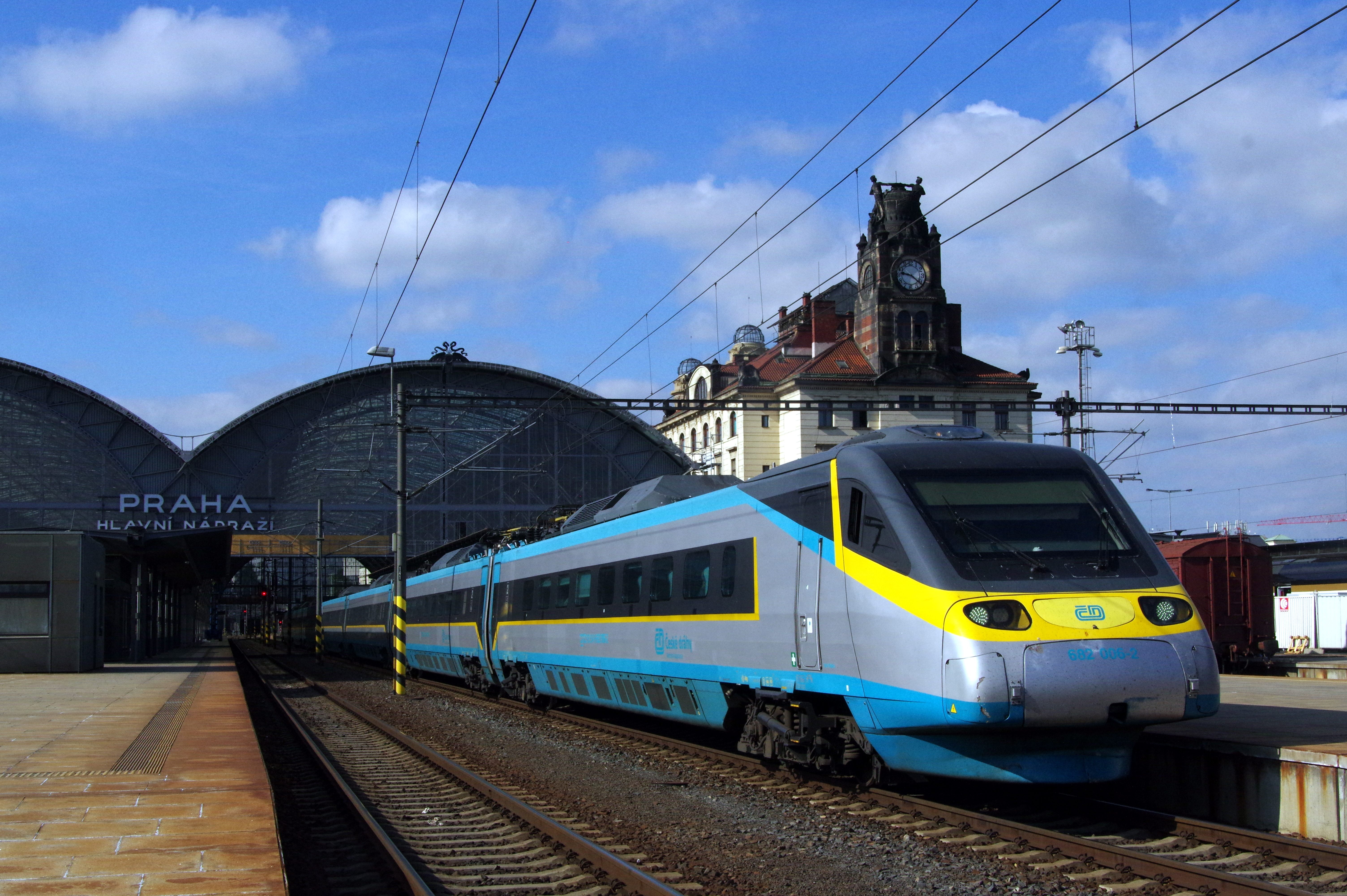 8.8.17 1 Pendolino Praha 1